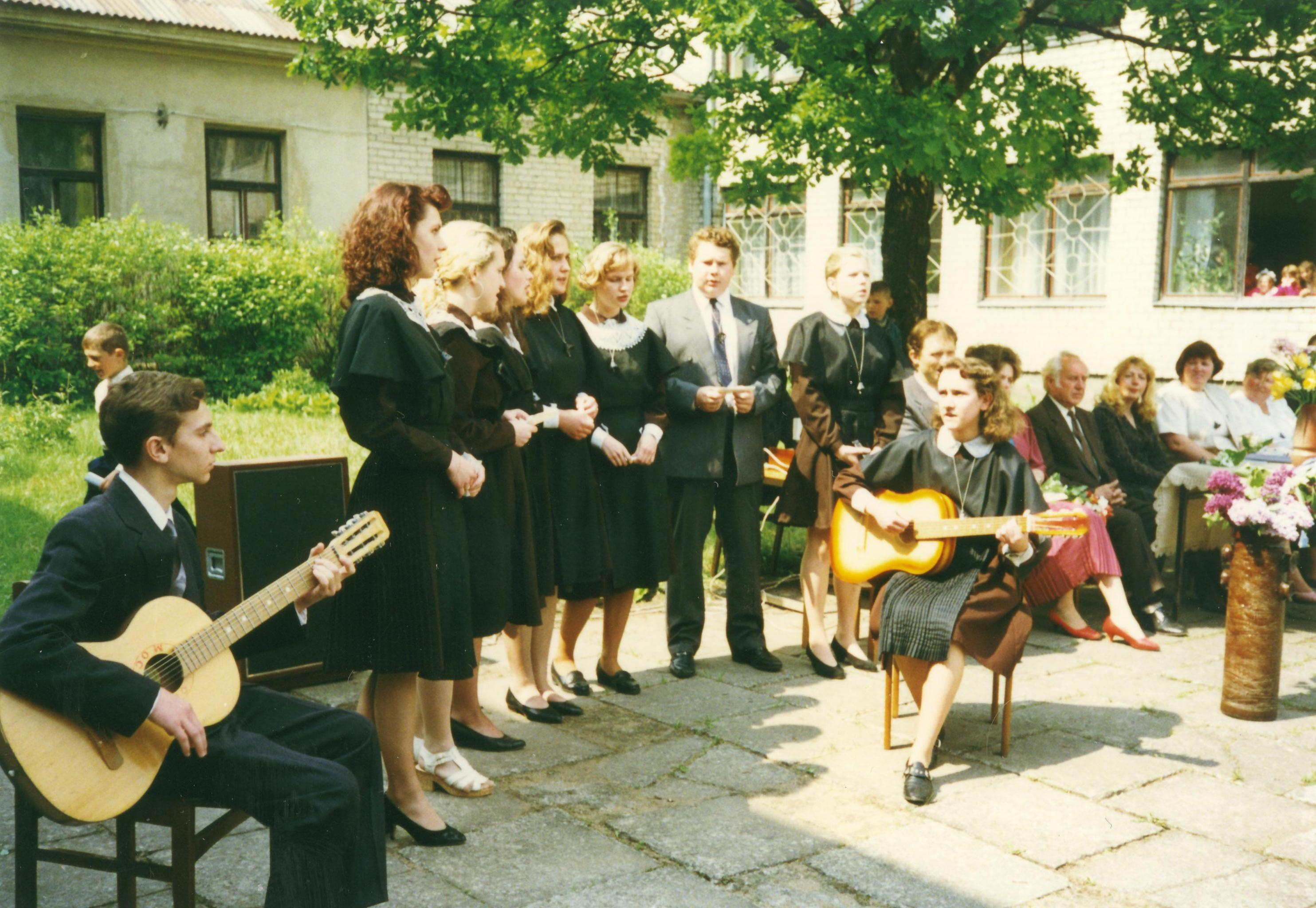 3 vidurinė mokykla. 1996 metų gegužės mėnuo. Mokykla išlydi mokyklą bebaigiančius dvyliktokus (abiturientus). Renginys vyksta mokyklos kiemelyje. Dalyvauja laidos 12 A klasės abiturientai, kurie atsisveikina su mokykla. Paskutinis skambutis" mokyklos kiemelyje po ąžuolu. Dešinėje sėdi mokyklos pedagogai: biologas Rolandas Greblikas, matematikė Lilija Kulitienė, mokyklos direktorius fizikas Kazys Šerėnas († 2010 m.), lituanistė Ona Mecelienė, rusistė Gražina Žaglinskienė (Švėgždė) ir matematikė Vitalija Jankauskienė.